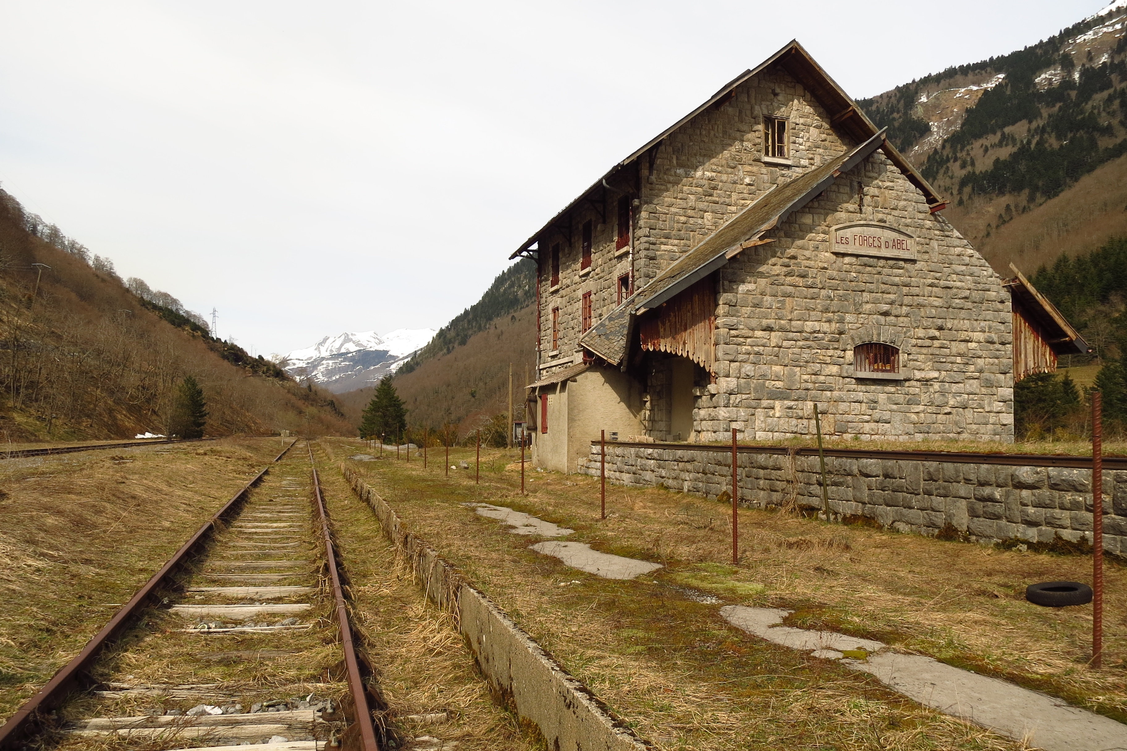 Borce (Pyrénées-Atlantiques, Aquitaine, France) - Gare des Forges d'Abel.